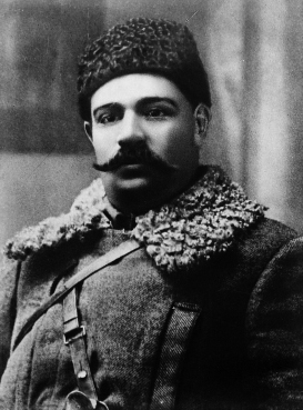 Александр Яковлевич Пархоменко — революционер, большевик.